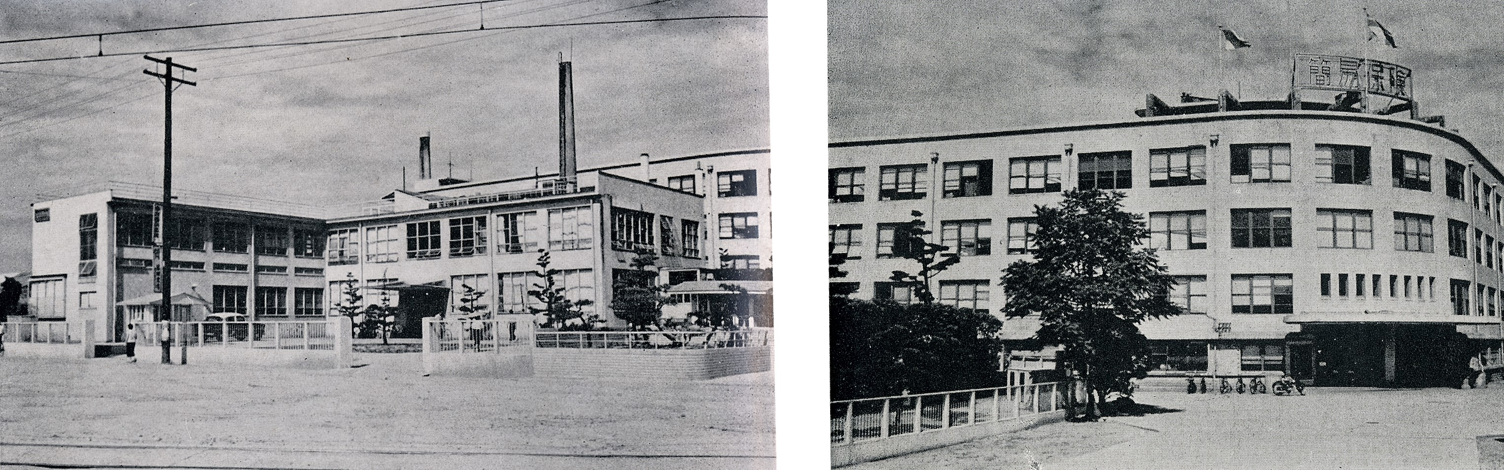 1955年の中国電気通信局本館および広島逓信病院（左）